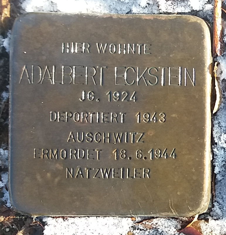 Stolperstein für Adalbert Eckstein, Mitglied der Großfamilie Eckstein, Vöhringen (Iller)